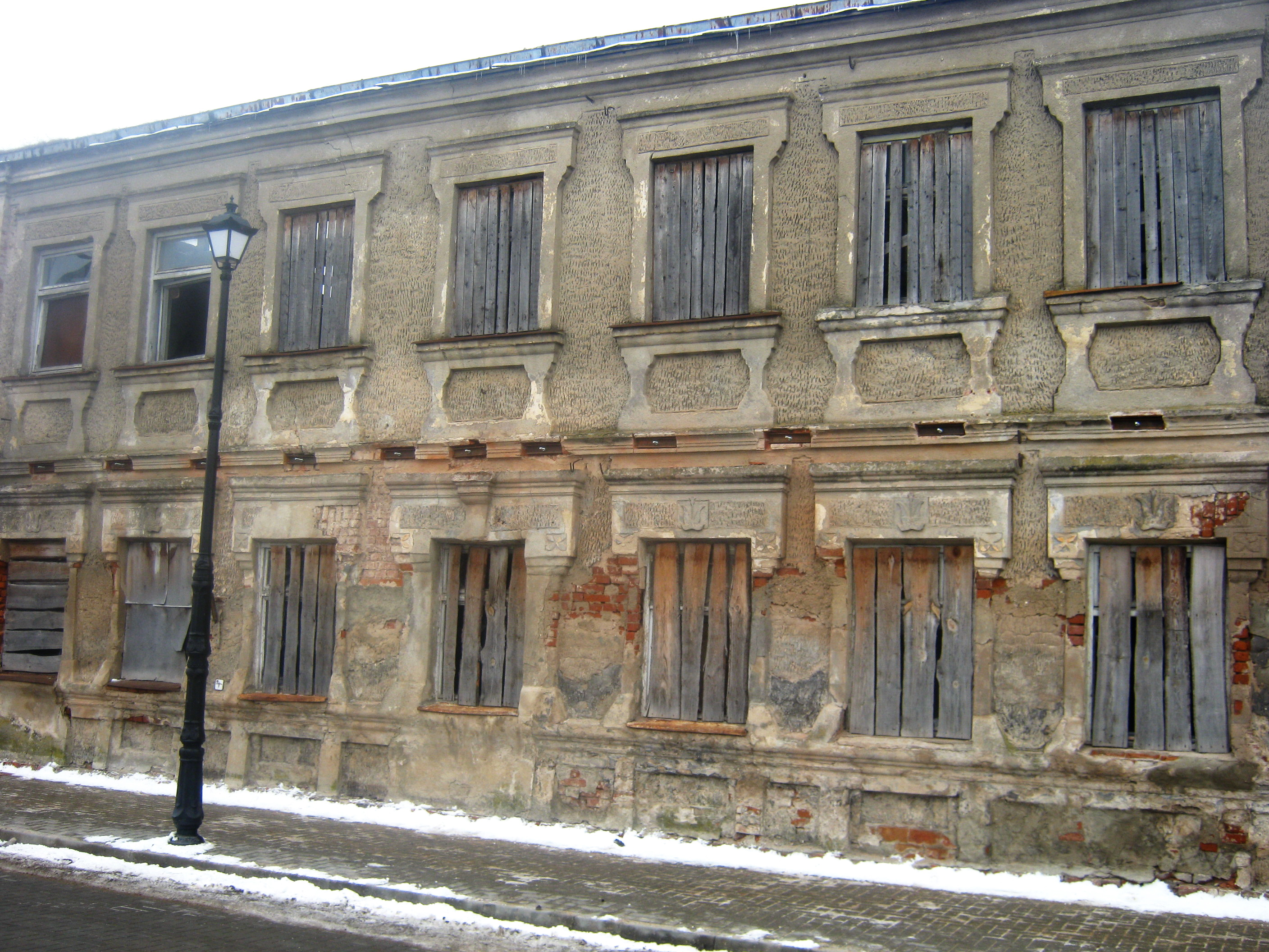 Kauno gatvė 48, Jonava